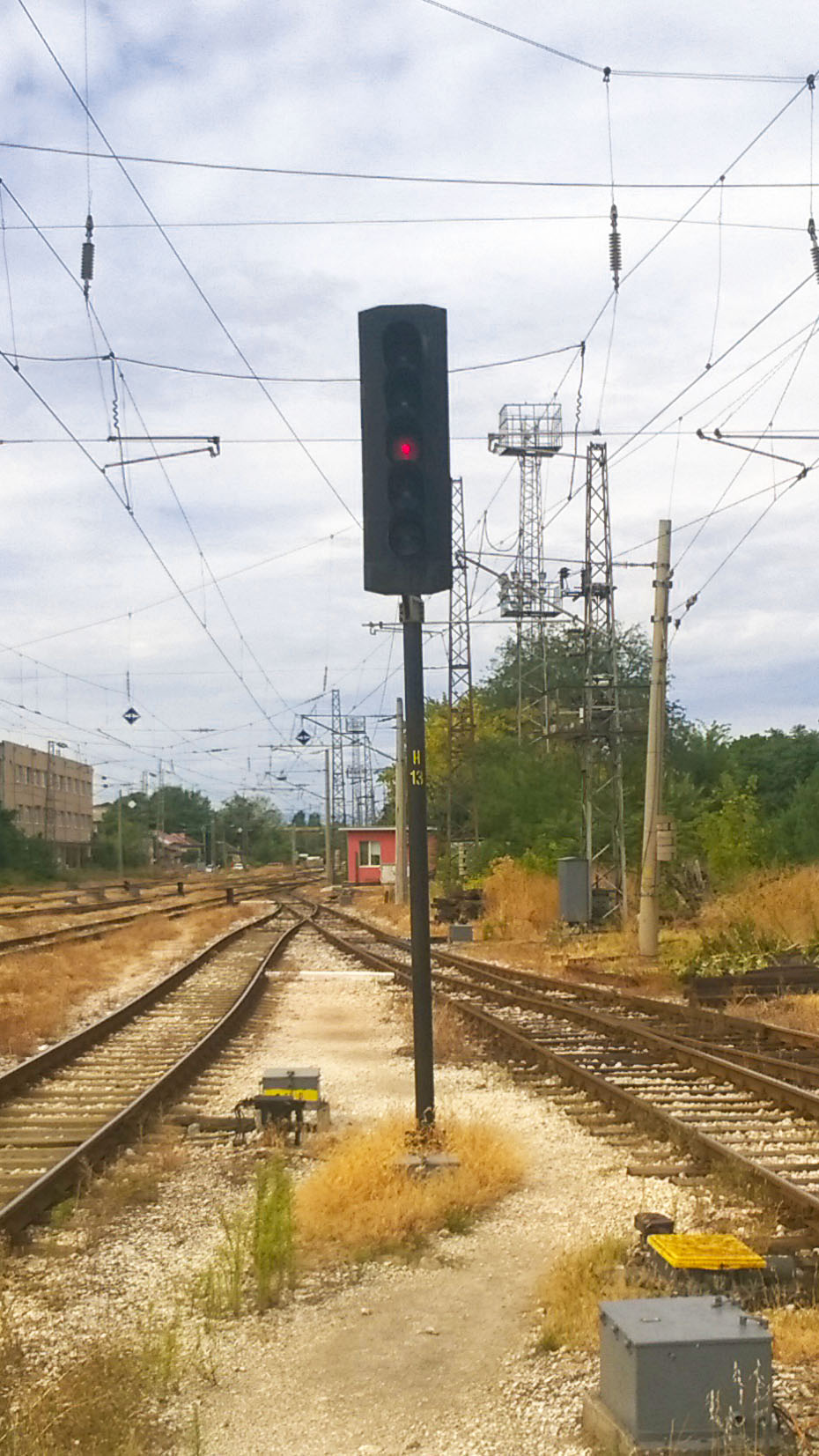 Изходен светофор Н13 в гара Пловдив